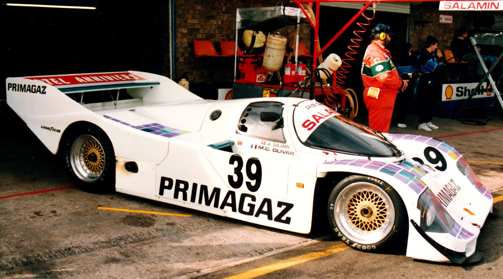 La Porsche 962 de Salamin Cohen-Olivar à Donington en 1990